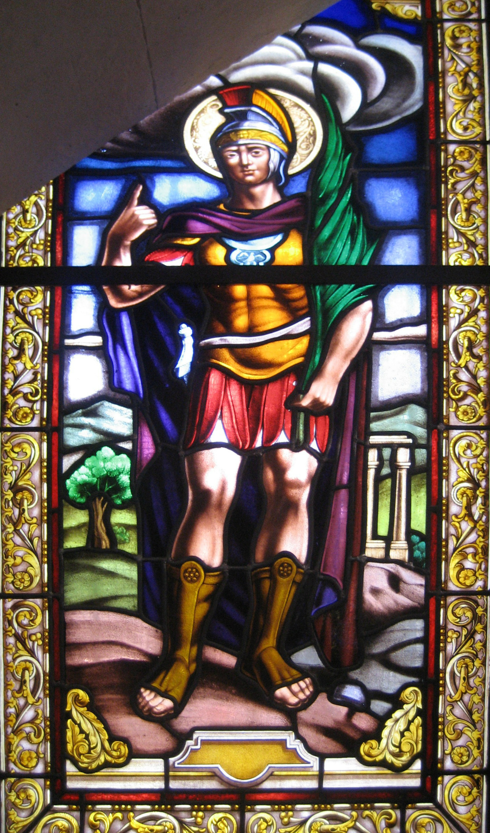 Cuba, Parroquia de San José de Jatibonico: Vitral de San Victoriano.